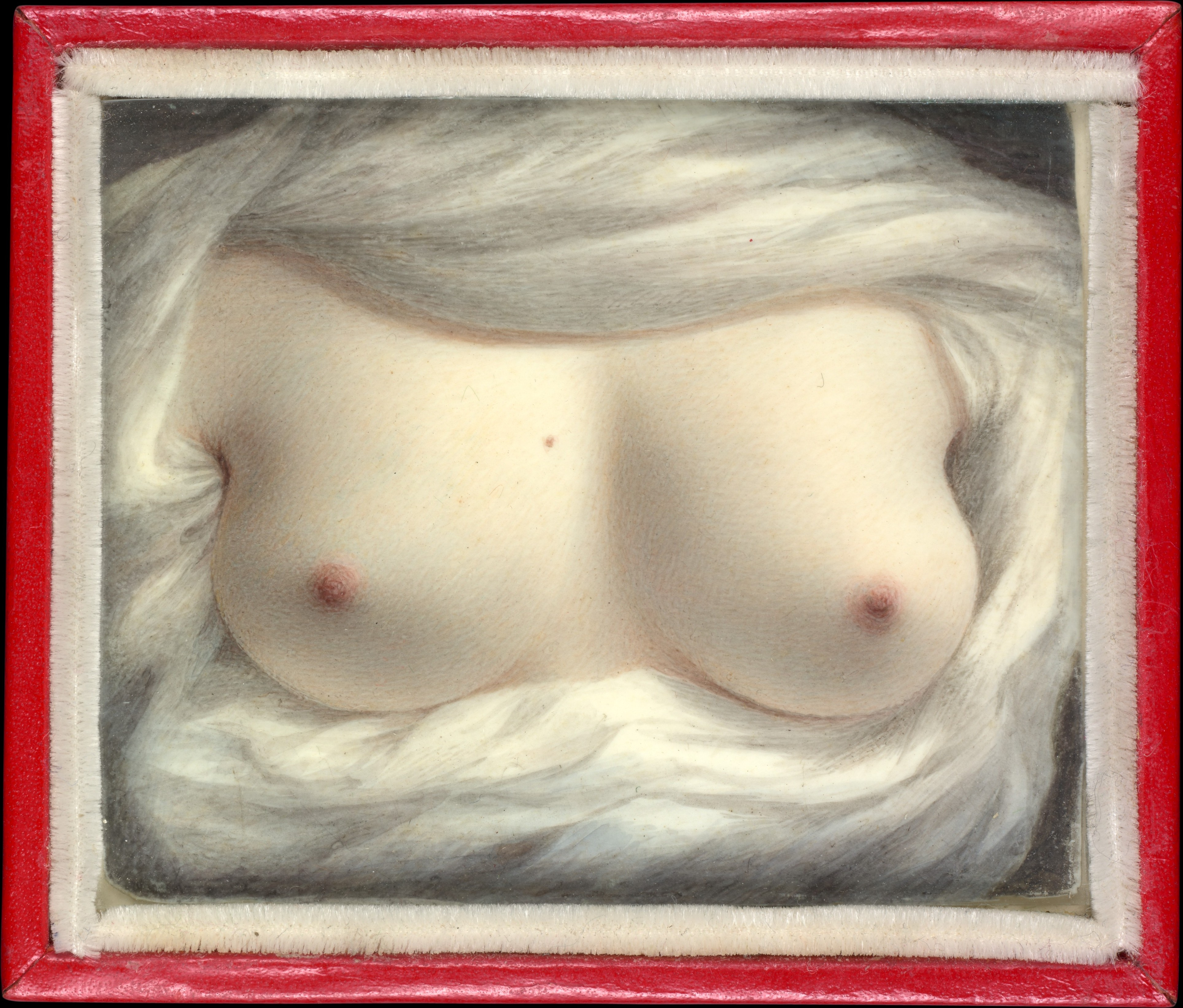 Painting, miniature; Paintings